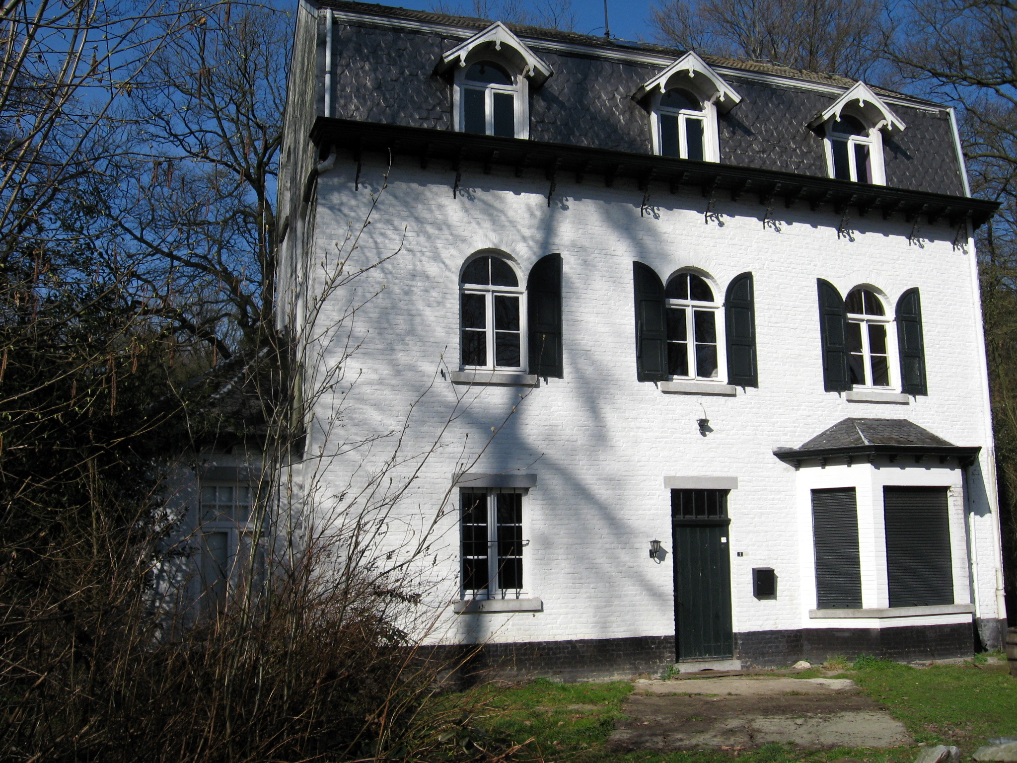 Alleen- en leegstaand burgerhuis, Luciebos 1 in Houthalen